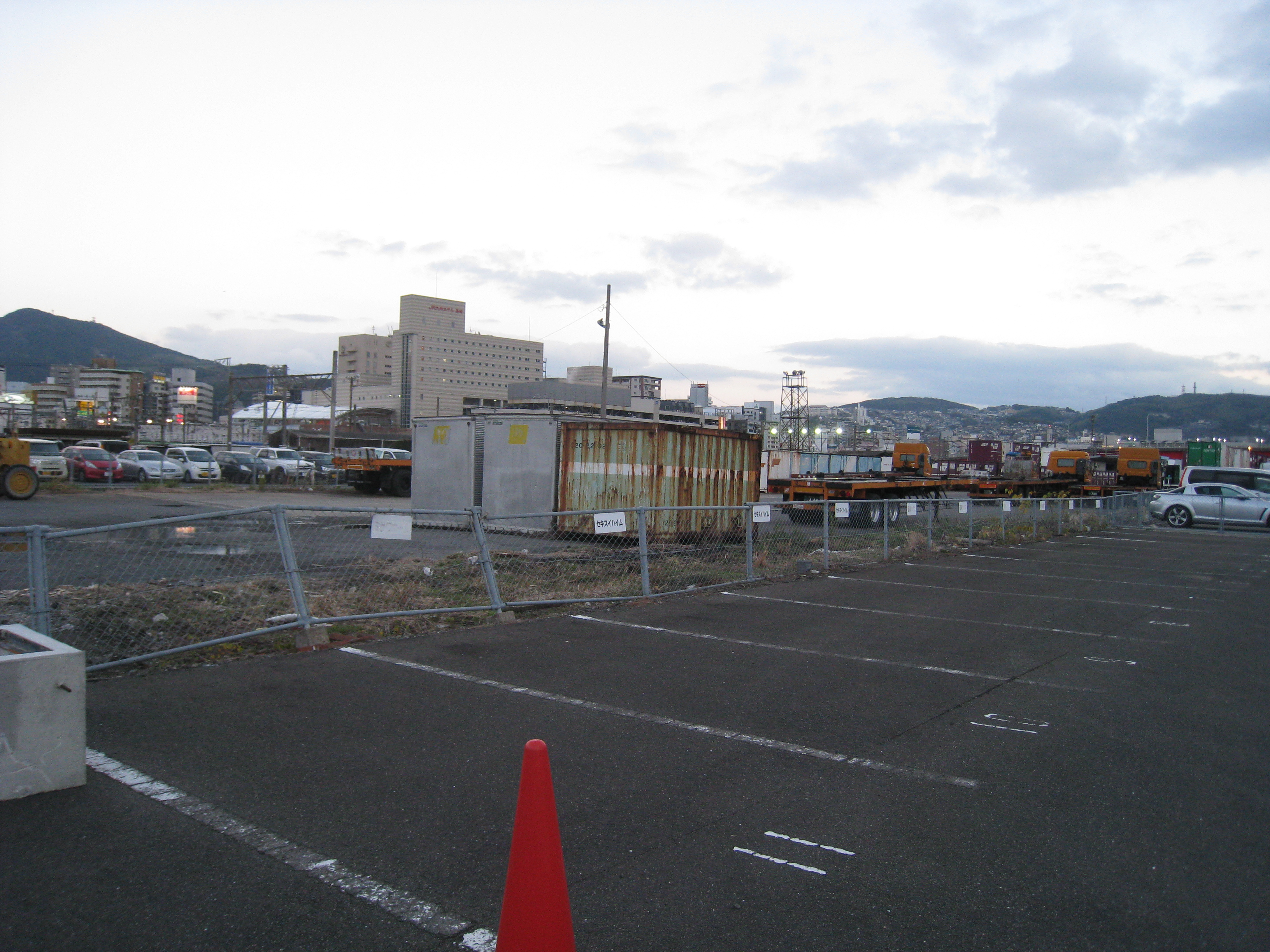 長崎駅撮影